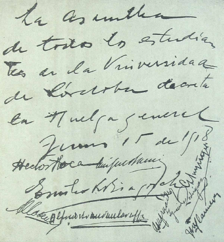 Fotografía del Acta declarando la huelga general estudiantil en la Universidad Nacional de Córdoba el 15 de junio de 1918, que dio origen al Movimiento de Reforma Universitaria.